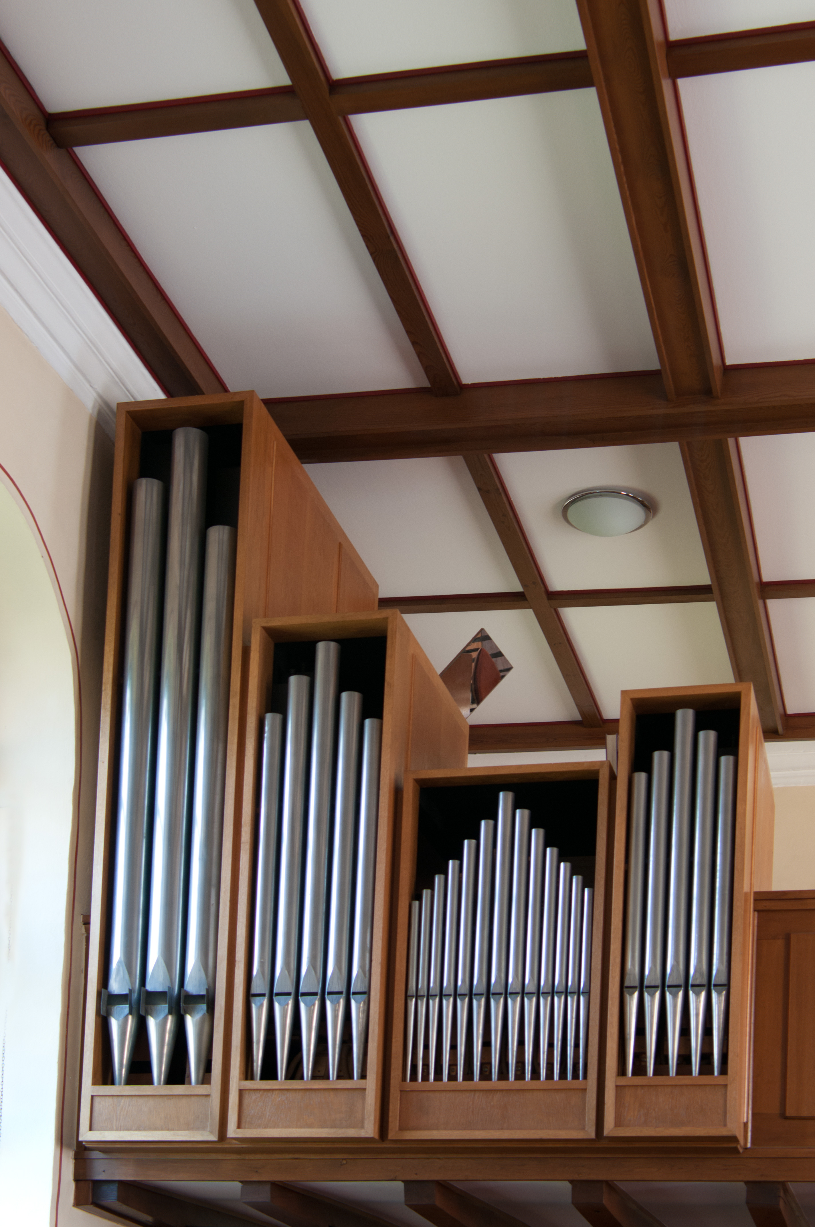 Medebach, evangelische Kirche, Orgel